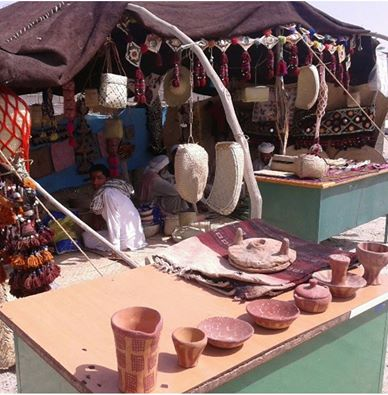 صنایع دستی بلو.چستان